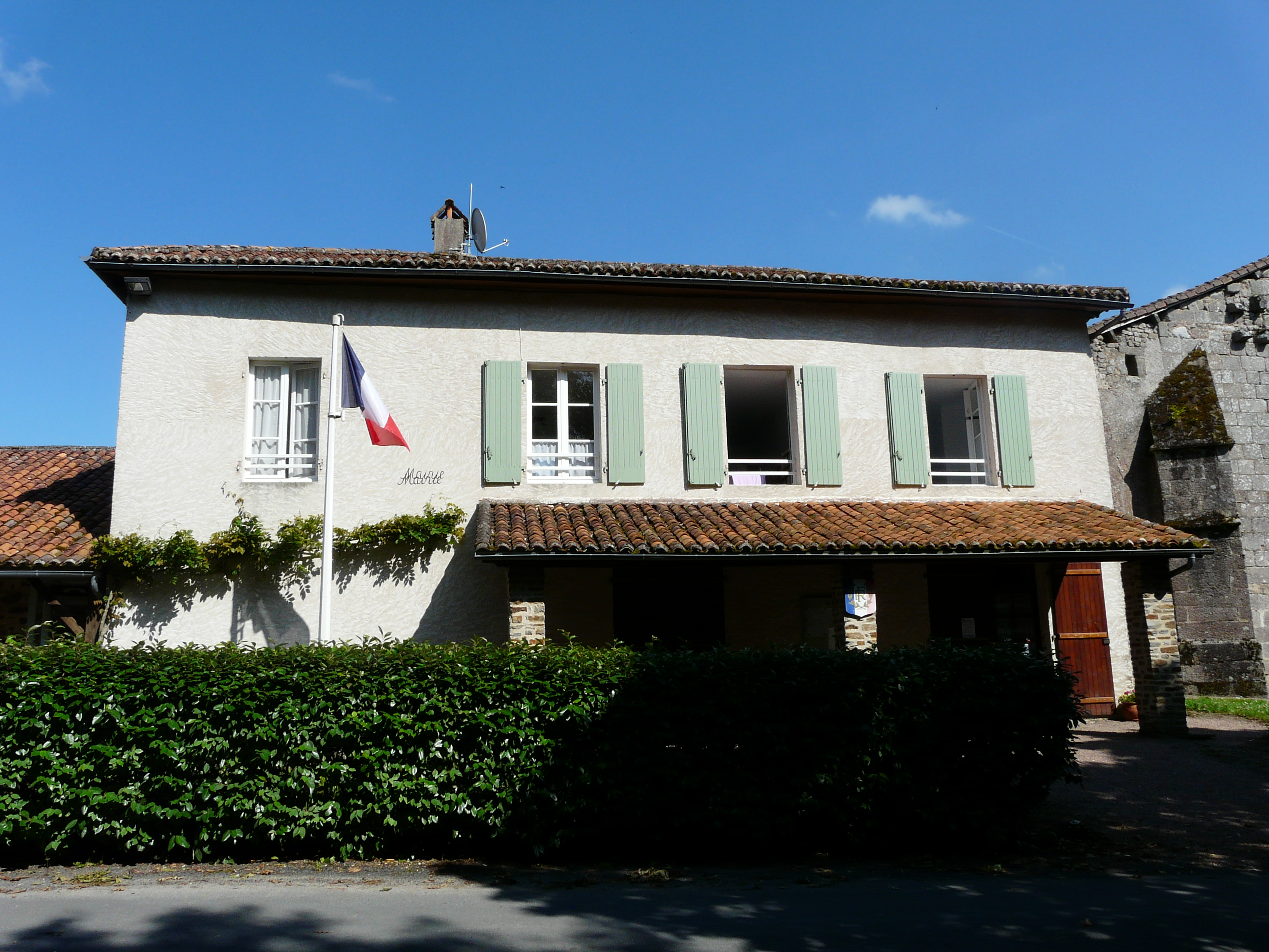 La mairie du Bourdeix, Dordogne, France.